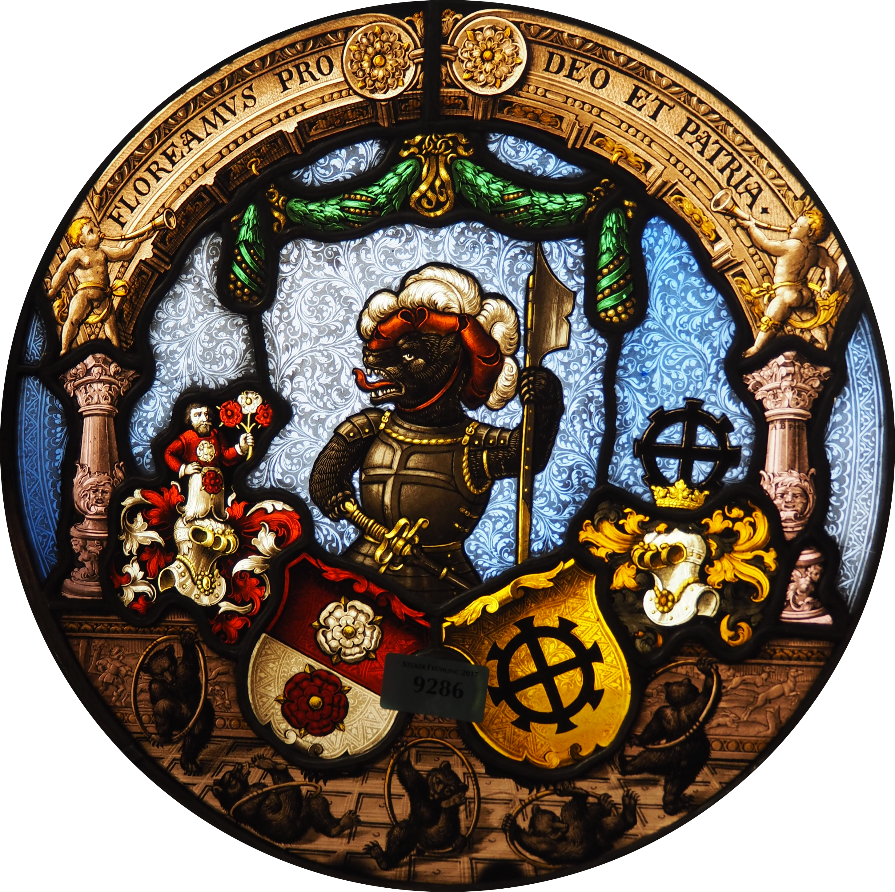 Stuker, Spring 2017, Nr. 9286